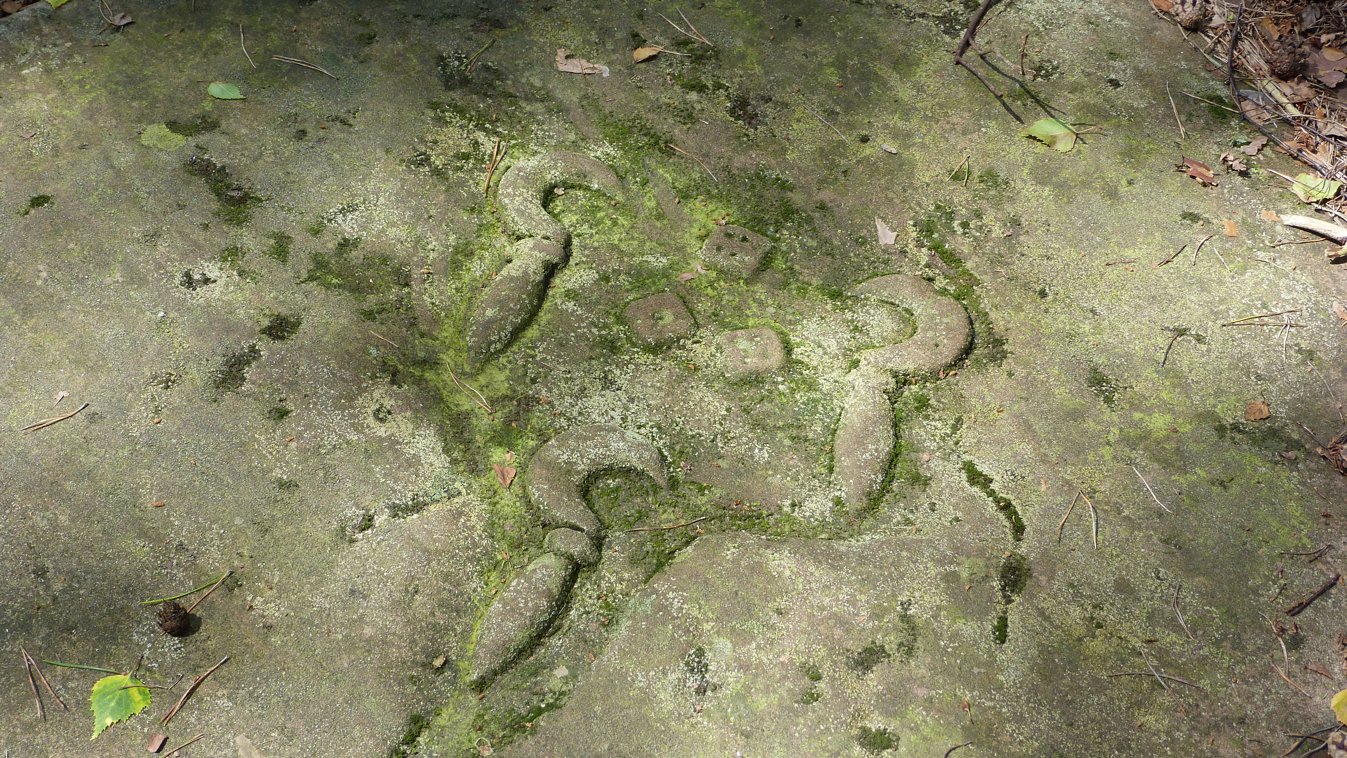 Loogfels